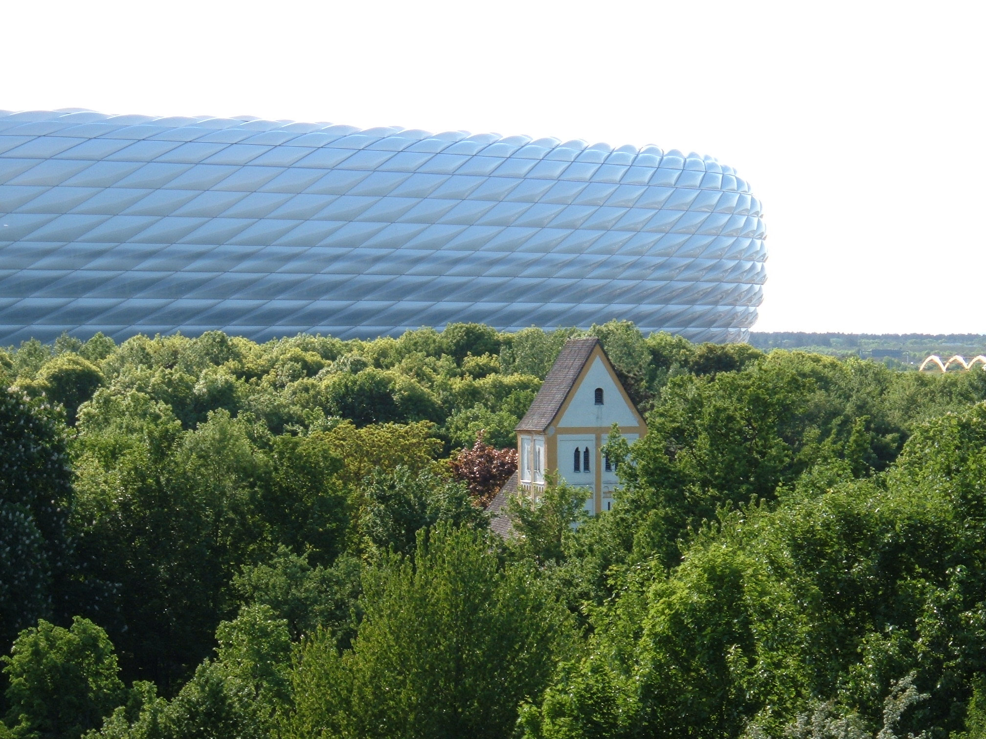 Heilig-Kreuz-Kirche / Allianz Arena, Munich, Germany